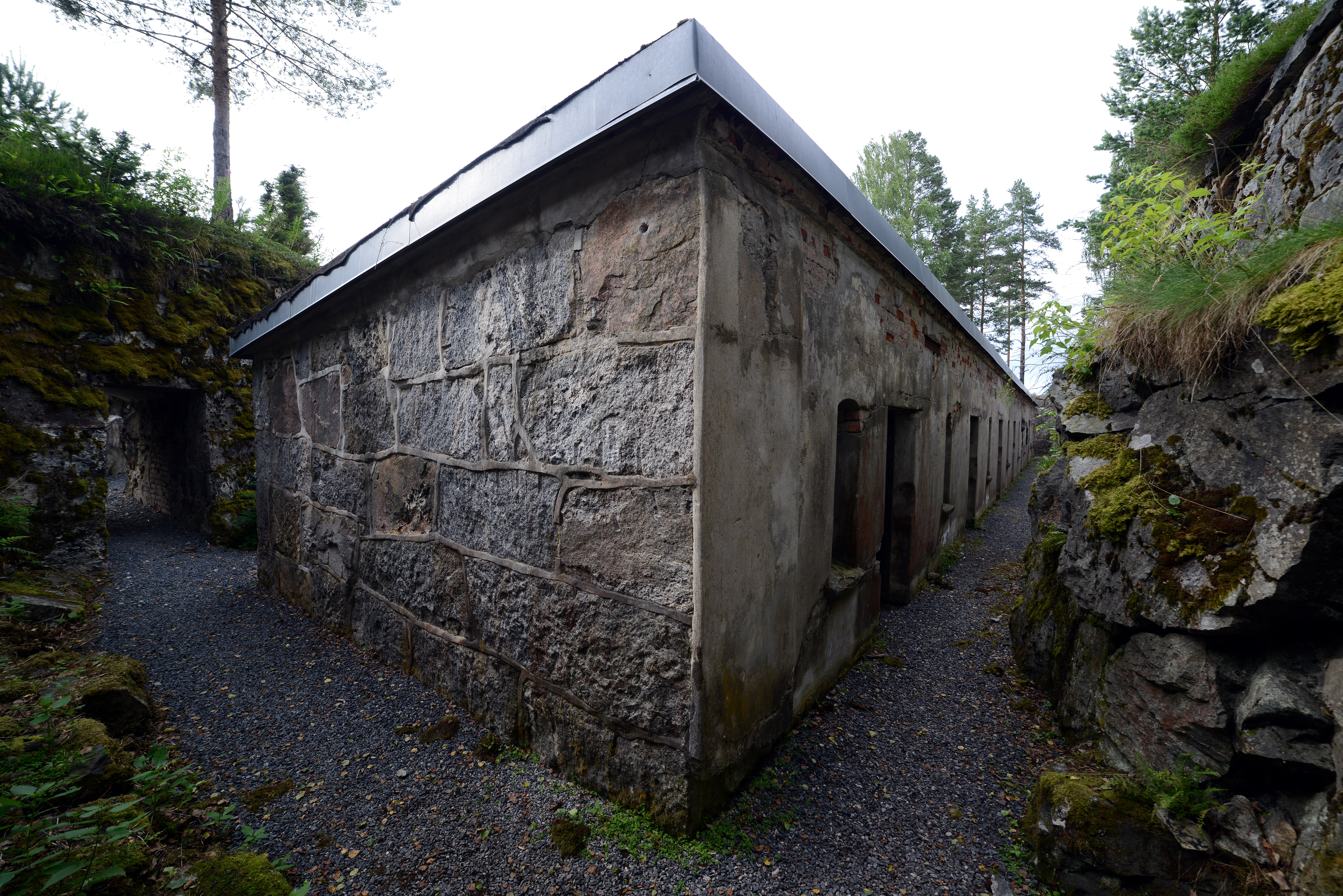 Urskog fort